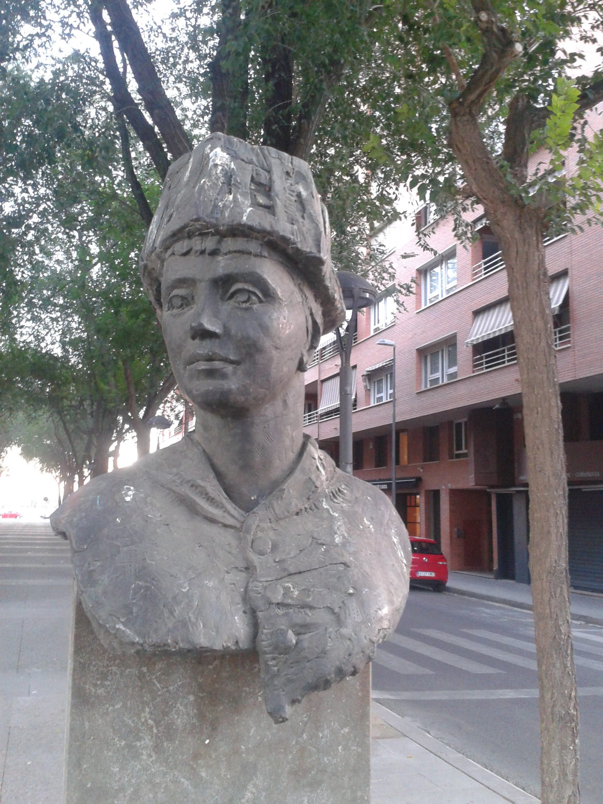 Bust de Martina Castells, situat a la Rambla Doctora Castells de Lleida